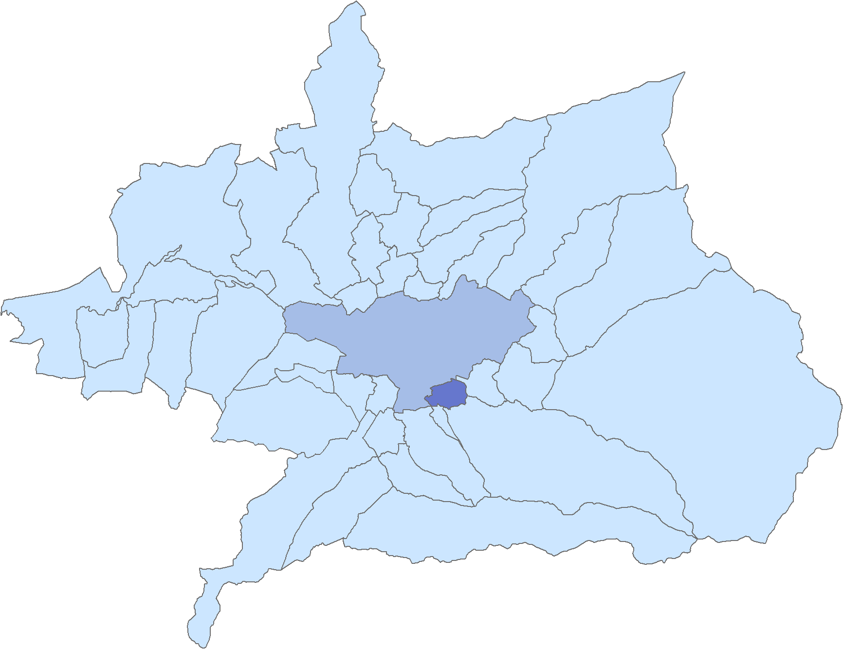 Situación del municipio de Huétor Vega respecto a la comarca de la Vega de Granada, en España.